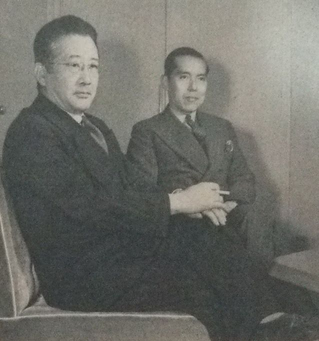 1920年入省の加瀬俊一（左）と1925年入省の加瀬俊一（右）